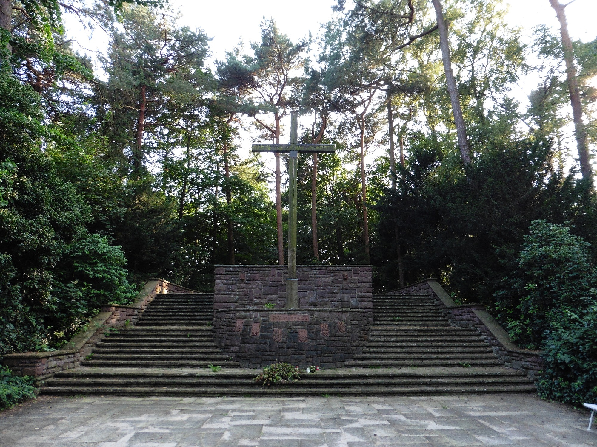 Vertriebenendenkmal auf dem Alten Friedhof Bergedorf